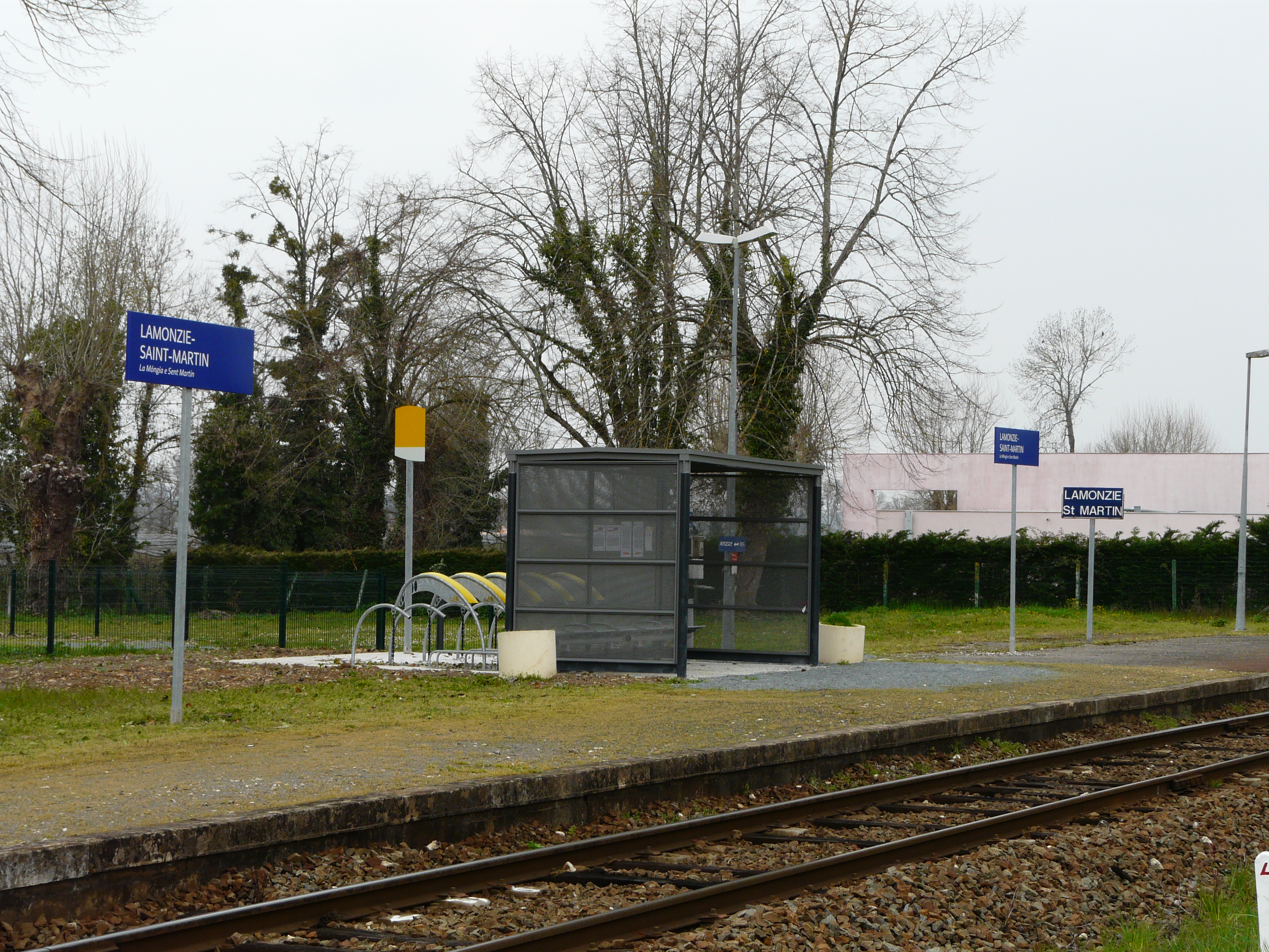 La gare de Lamonzie-Saint-Martin, Dordogne, France.